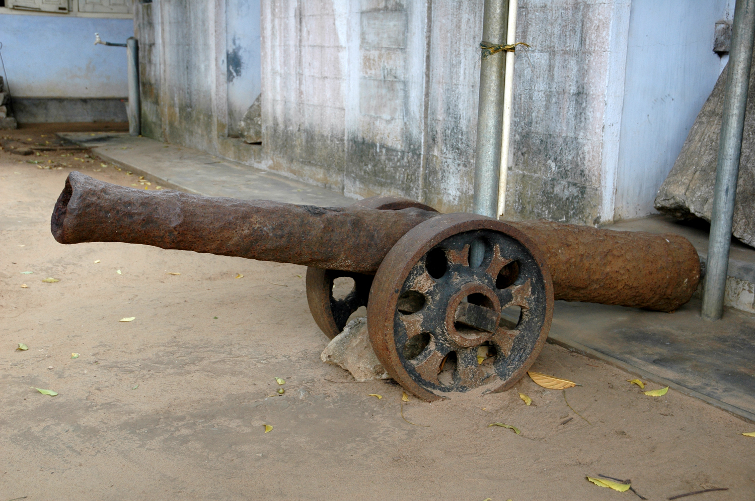 பிரித்தானிய கால பீரங்கி - தொல் பொருட்காட்சிச்சாலை, யாழ்ப்பாணம்